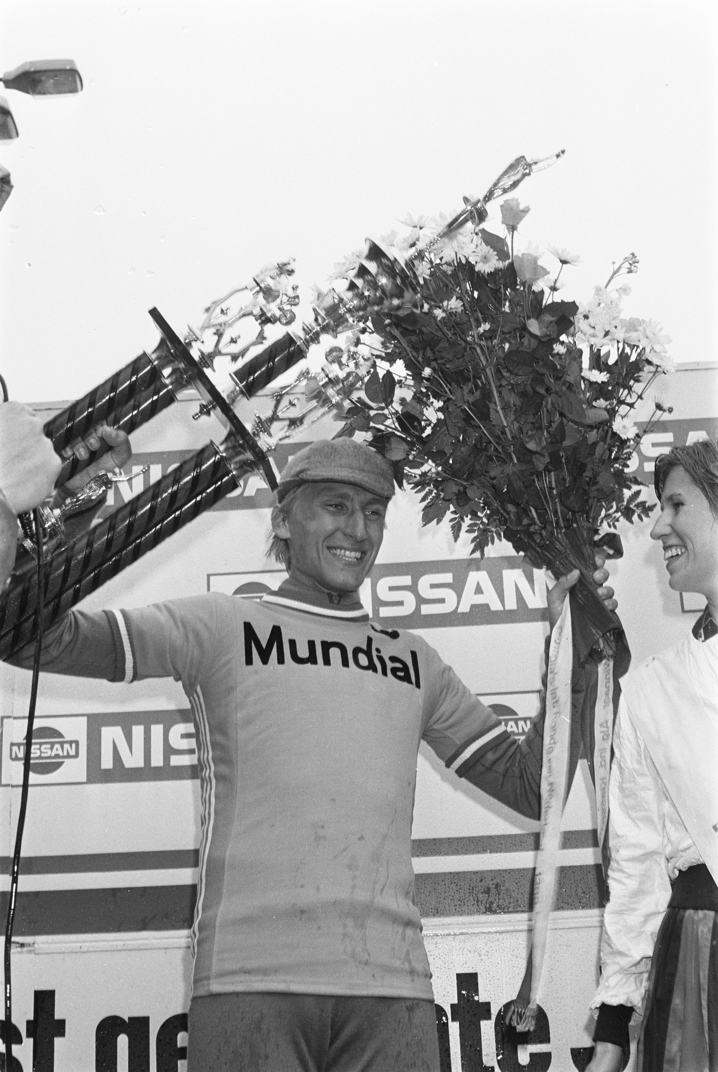 Collectie / Archief : Fotocollectie Anefo Reportage / Serie : [ onbekend ] Beschrijving : Huldiging van Mario Hernig uit de voormalige DDR, winnaar van Olympia's Ronde van Nederland 1983 Datum : 2 juni 1983 Trefwoorden : huldigingen, wedstrijden, wielrennen Persoonsnaam : Hernig, Mario Fotograaf : Croes, Rob C. / Anefo Auteursrechthebbende : Nationaal Archief Materiaalsoort : Negatief (zwart/wit) Nummer archiefinventaris : bekijk toegang 2.24.01.05 Bestanddeelnummer : 932-6085